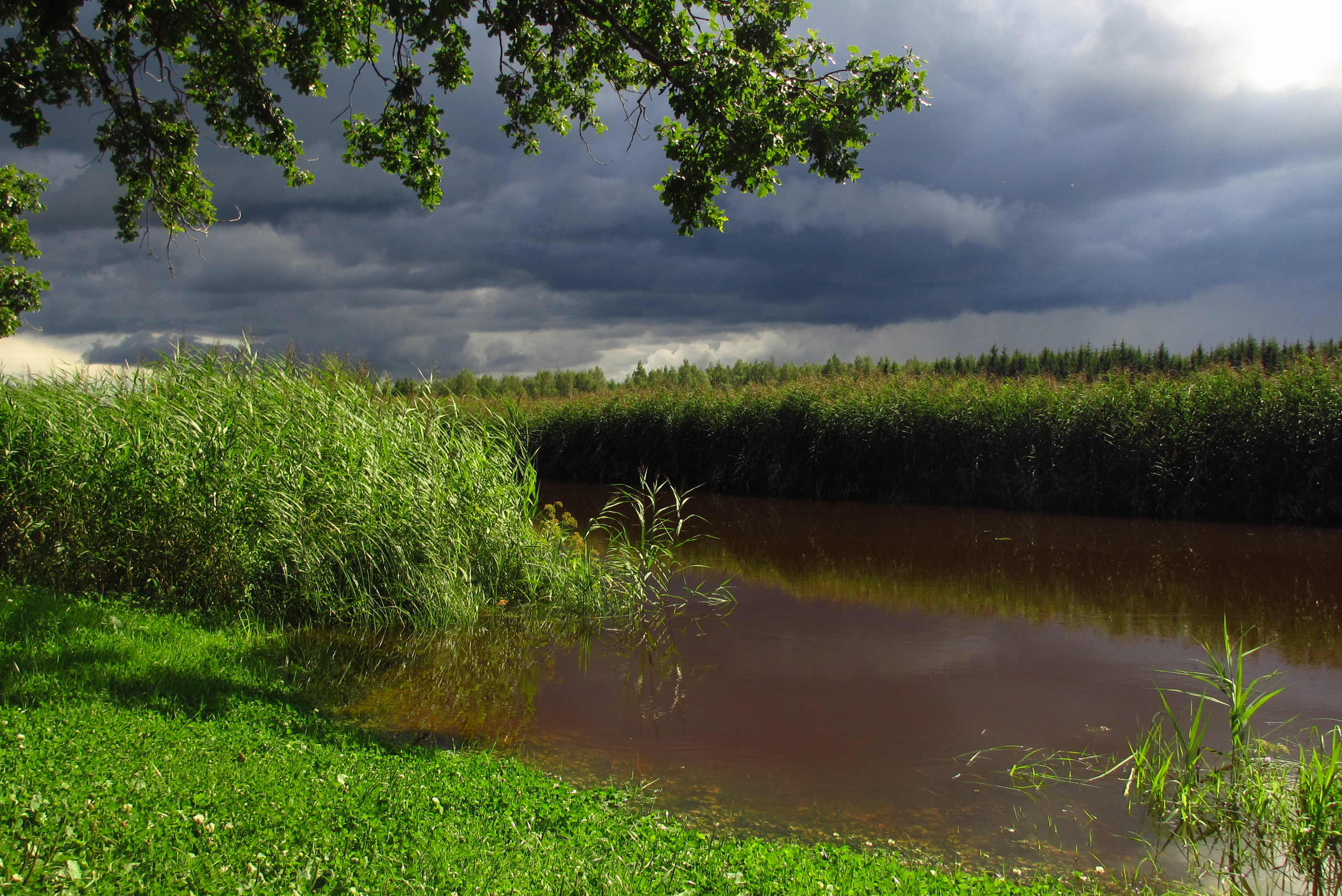 Raudna jõgi Soomaa Rahvuspargis Kuusekäära kohal